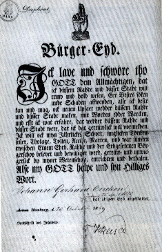 Hamburgischer Bürgereid von Johann Gerhard Oncken vom 20. Oktober 1859